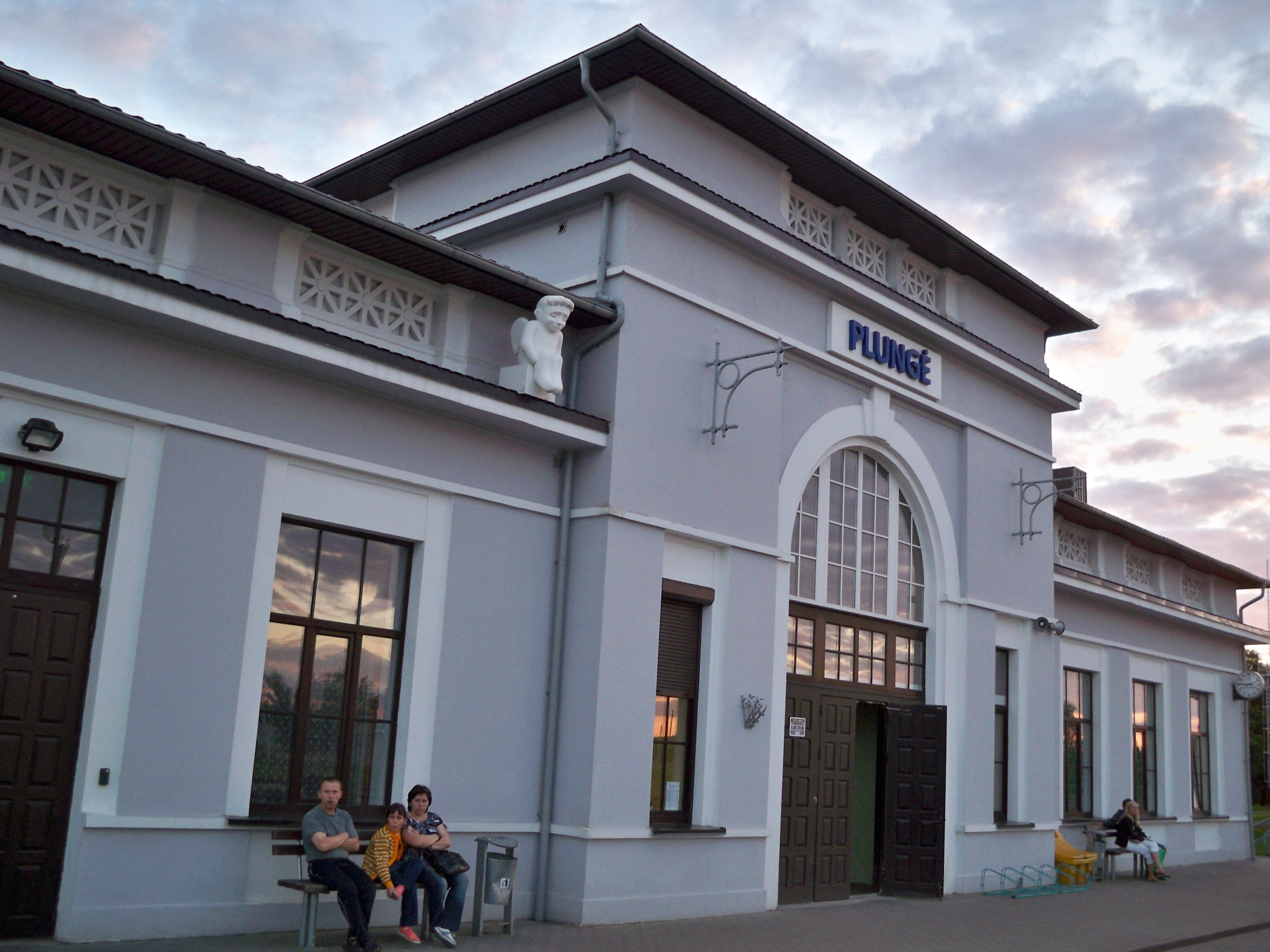 Plungės geležinkelio stotis